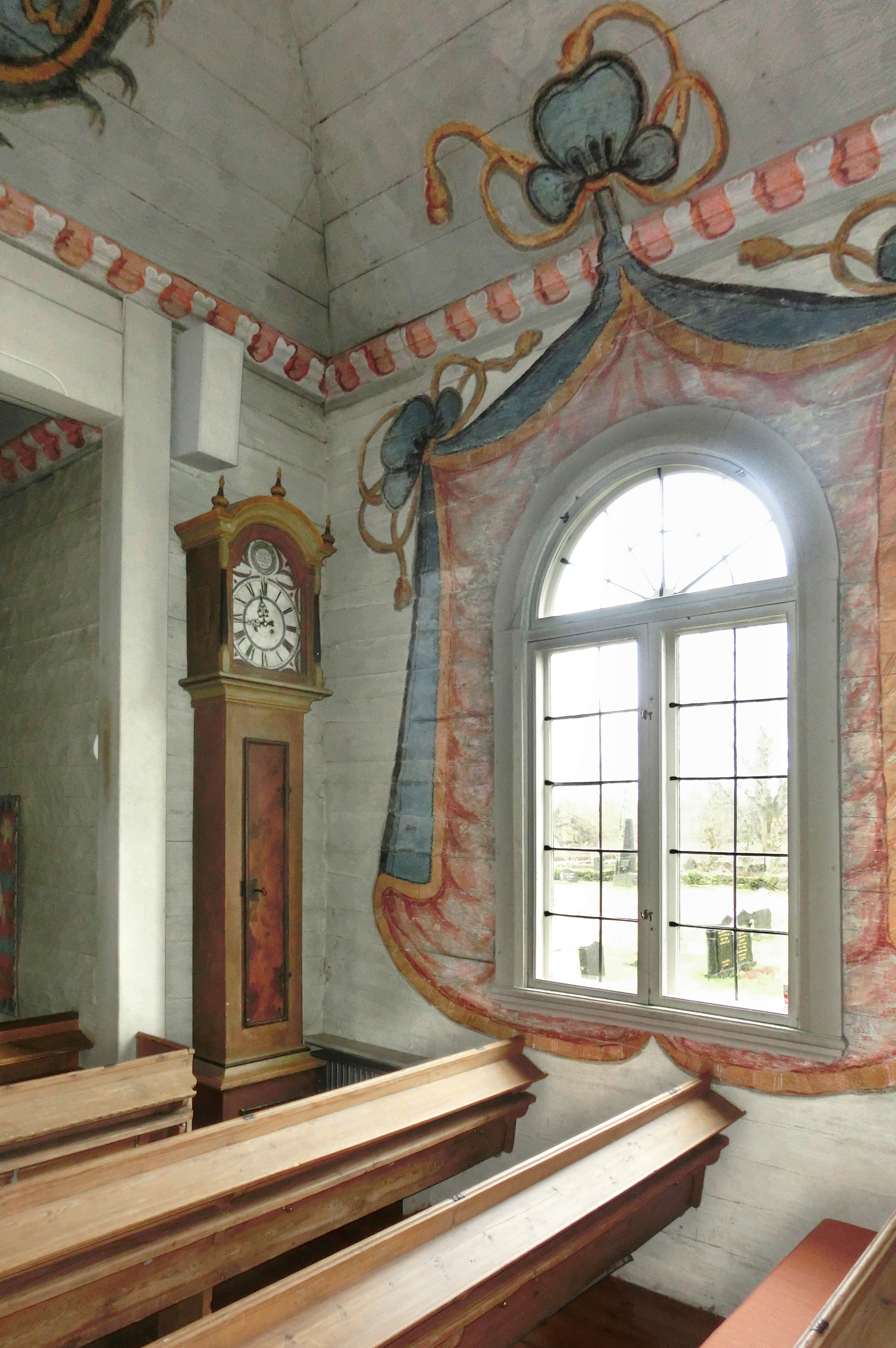 Golvur i Kävsjö kyrka, Kävsjö socken, Gnosjö kommun, Jönköpings län, Småland, Växjö stift, Sverige.